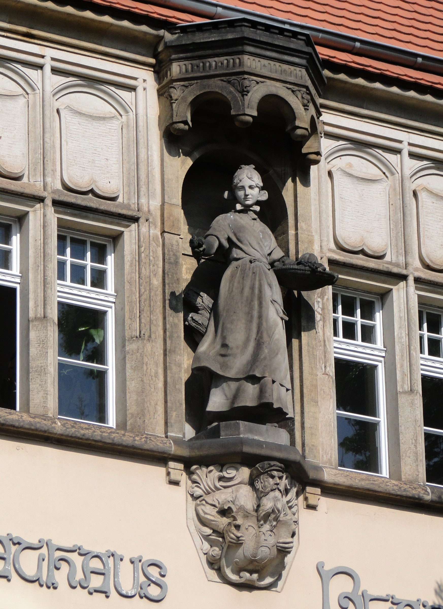 Statue der Gustl von Blasewitz am Rathaus Blasewitz